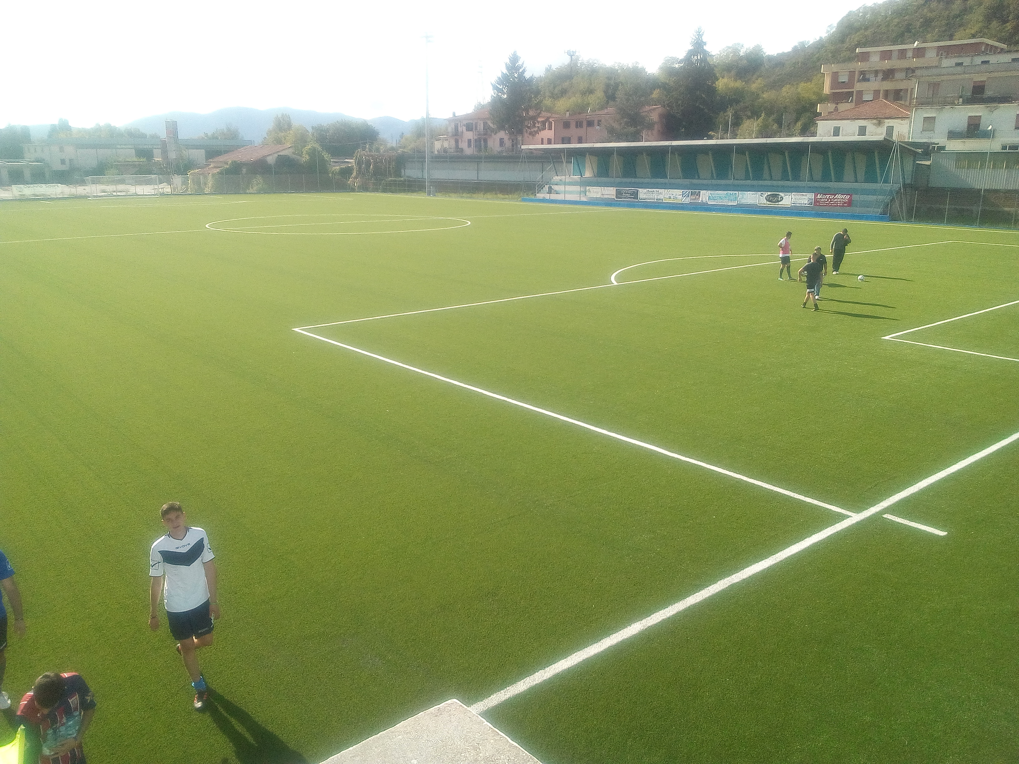 Stadio comunale di Carsoli, Abruzzo